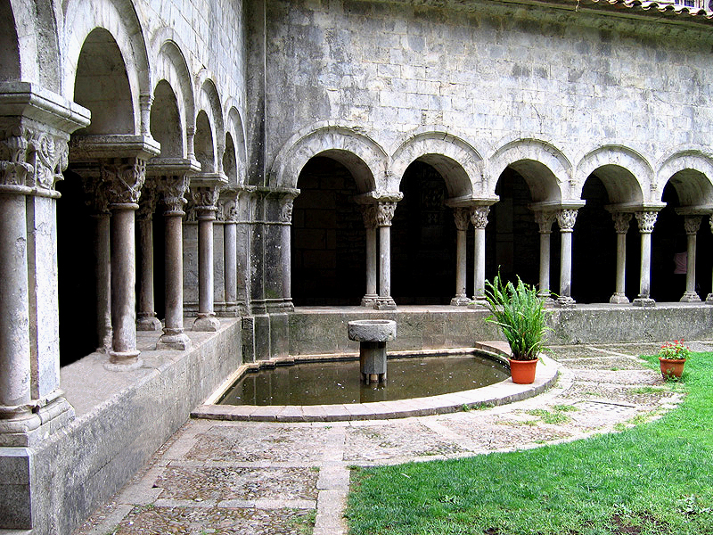 Claustro de la catedral de Gerona